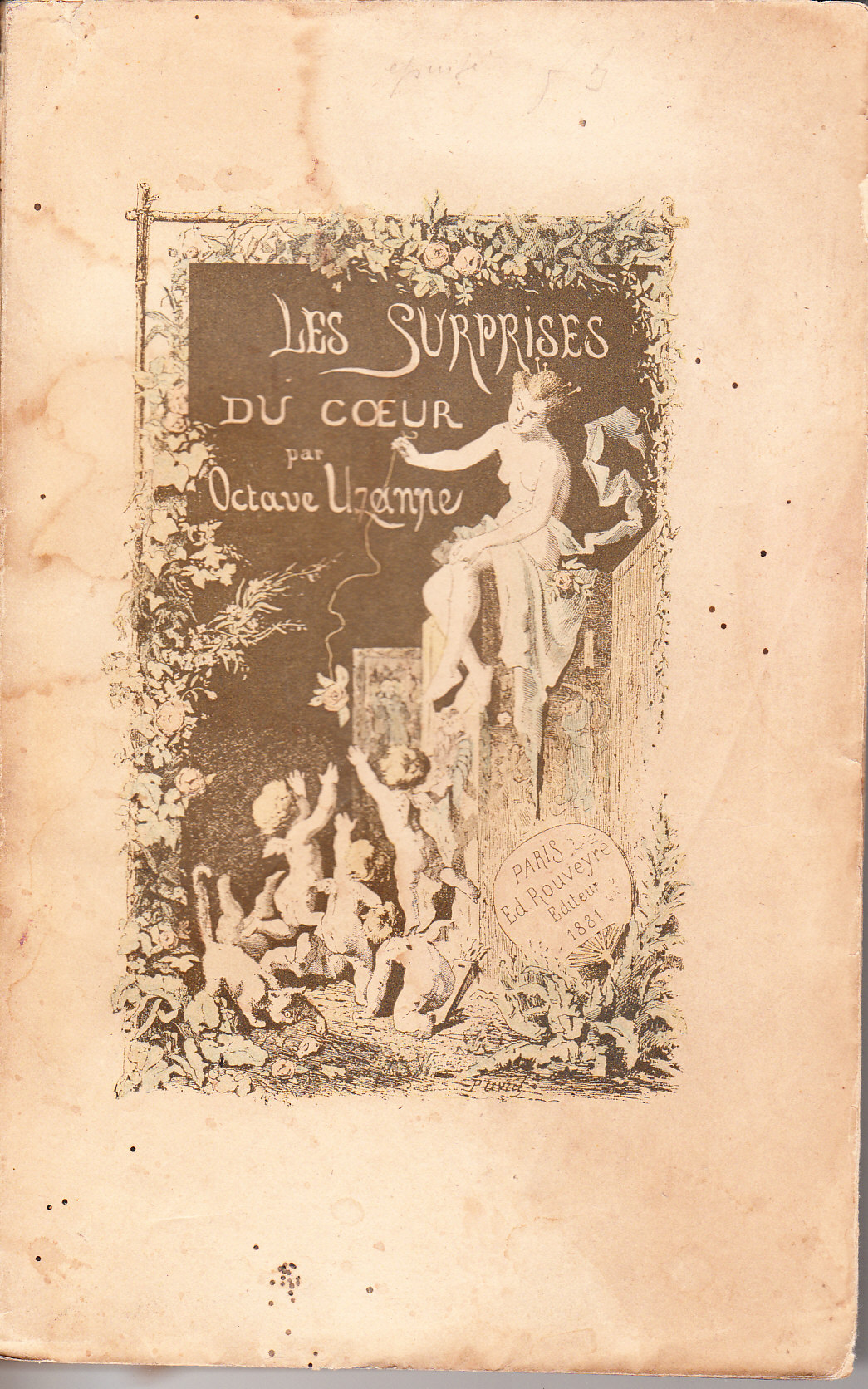 édition de 1888